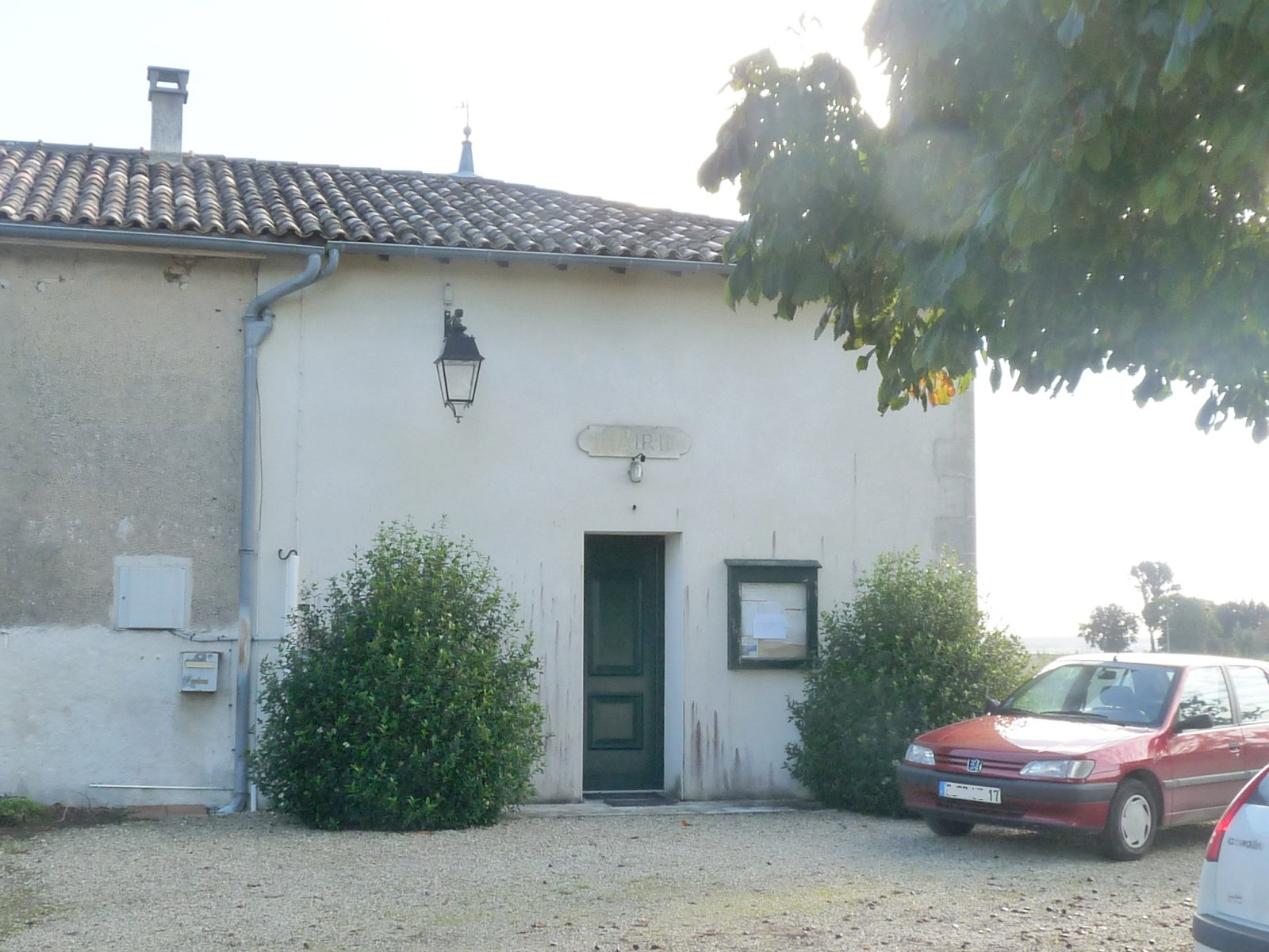 Mairie de Messac, Charente-Maritime, France